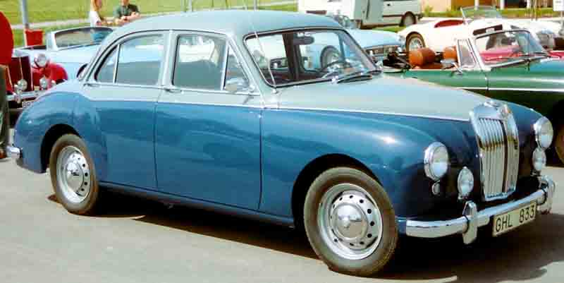 M.G. ZB Magnette 4-Door Saloon 1958